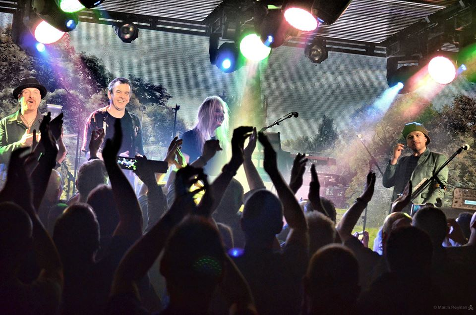 ライヴDVD収録時の写真（2015年）